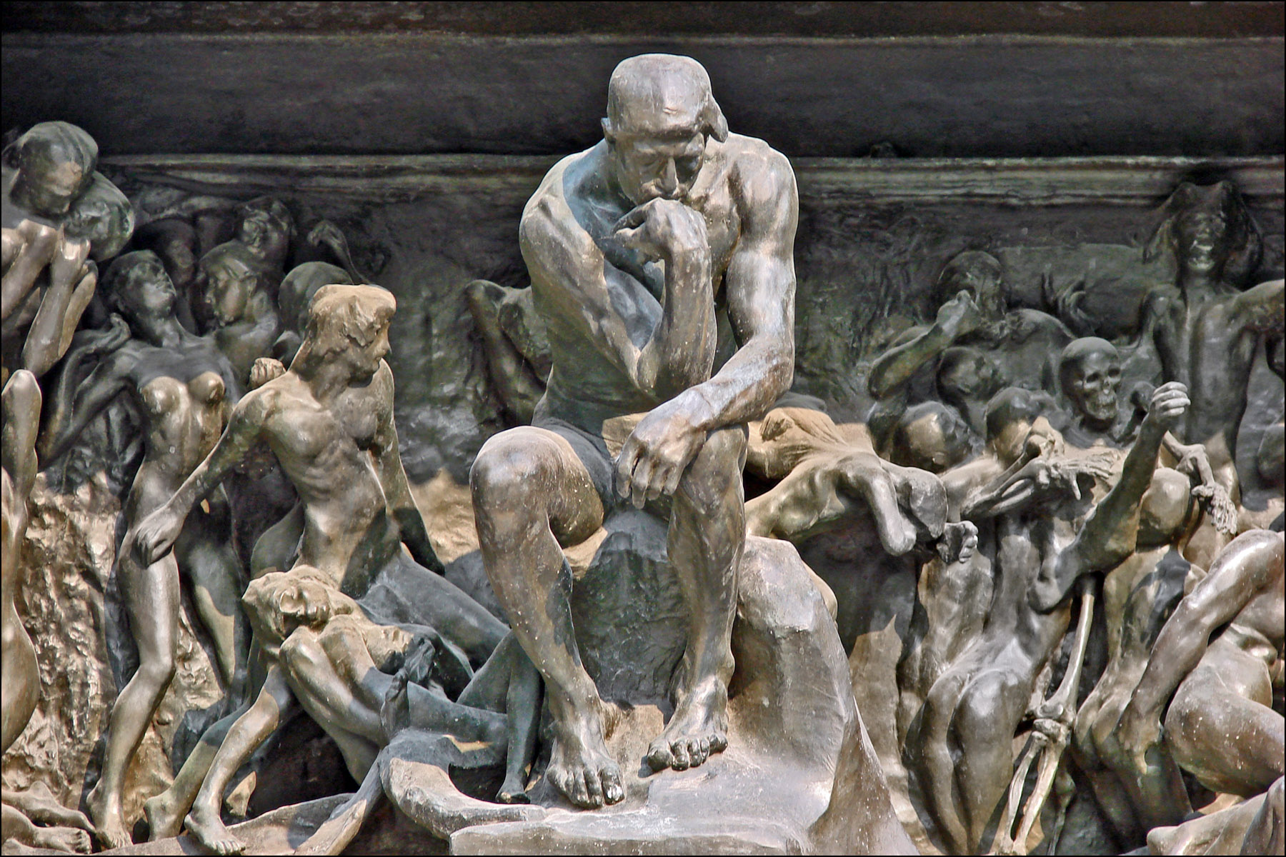 La Porte de l'Enfer a été dressée dans les jardins du musée Rodin en 1937. L'oeuvre de Rodin semble avoir été achevée vers 1890. voir le site du Wikipedia site officiel du musée